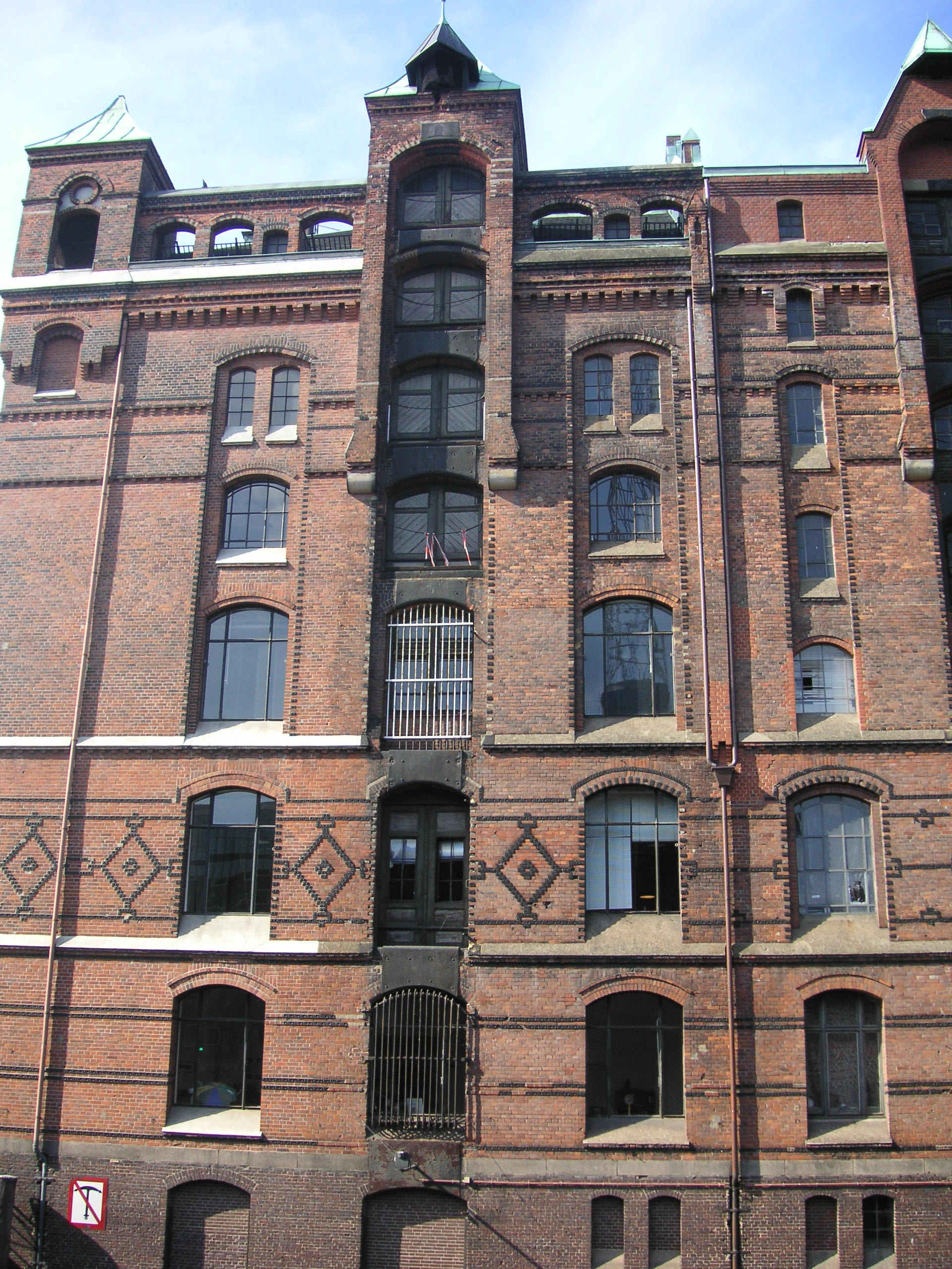 Speicherstadt in Hamburg This is the photograph of an architectural monument. It is part of the list of cultural monuments of Hamburg, no. 968